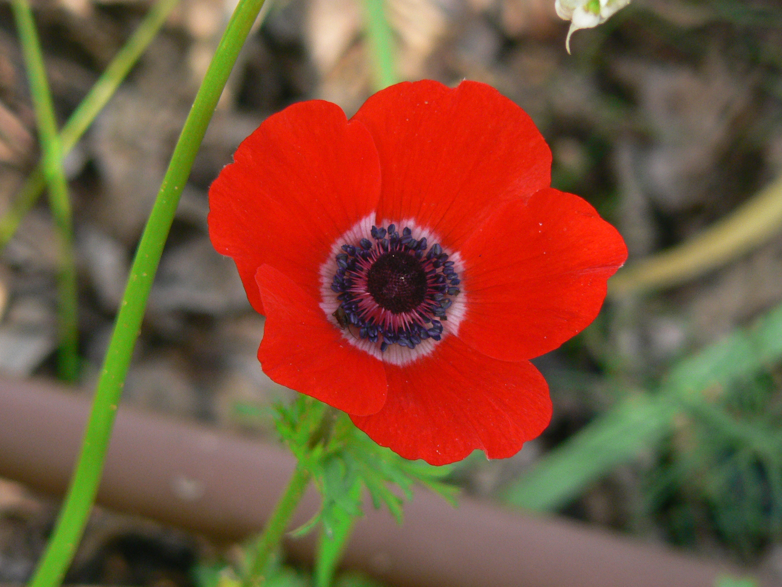 כלנית מצויה Anemone coronaria